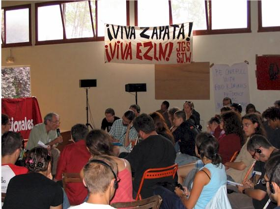 Daniel Bensaïd de la LCR participe à un débat avec les jeunes militants de la IVéme Internationale lors des RIJ de 2005.